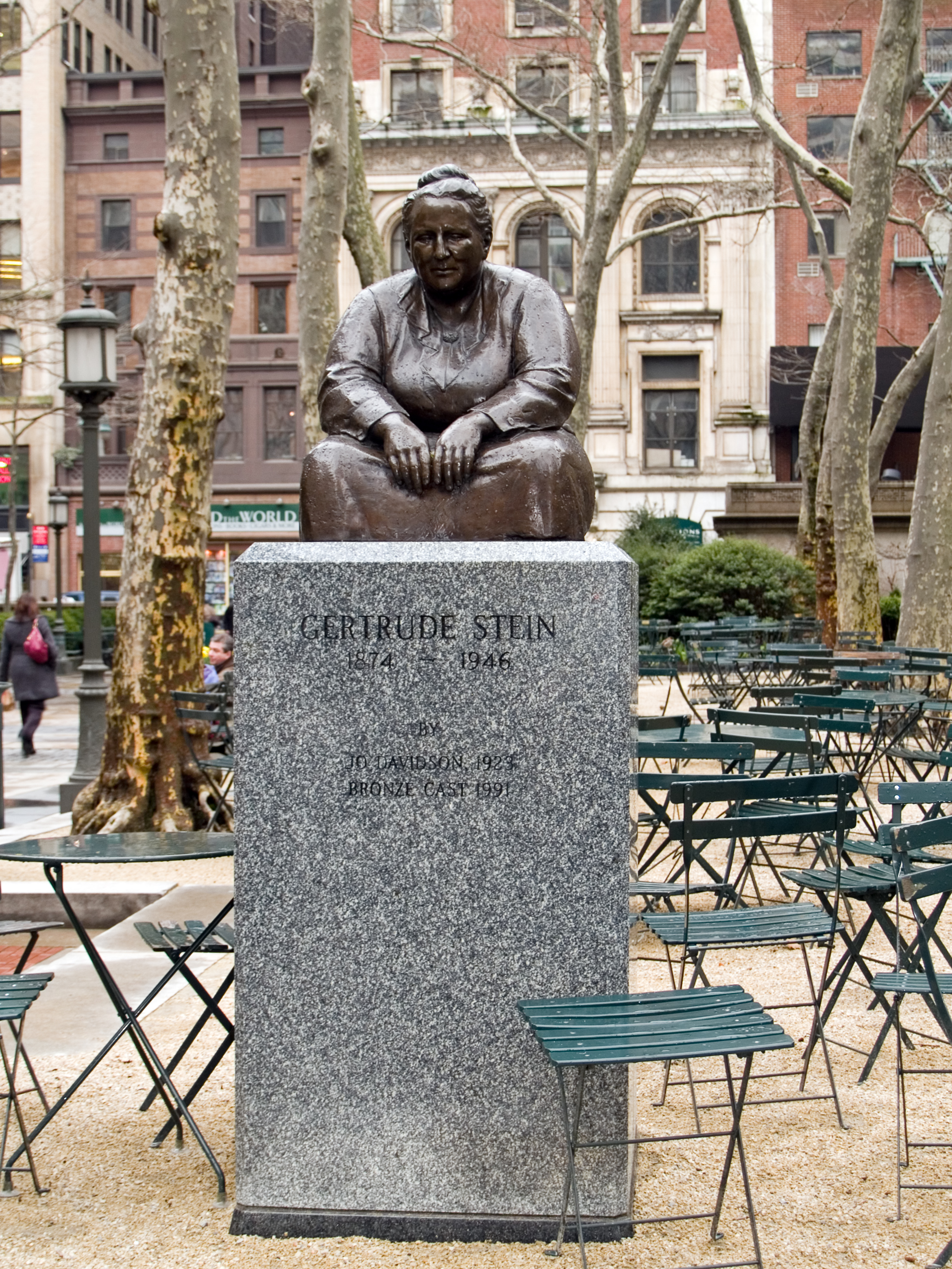 Gertrude Stein Statue im Bryant-Park hinter der Public Library New York